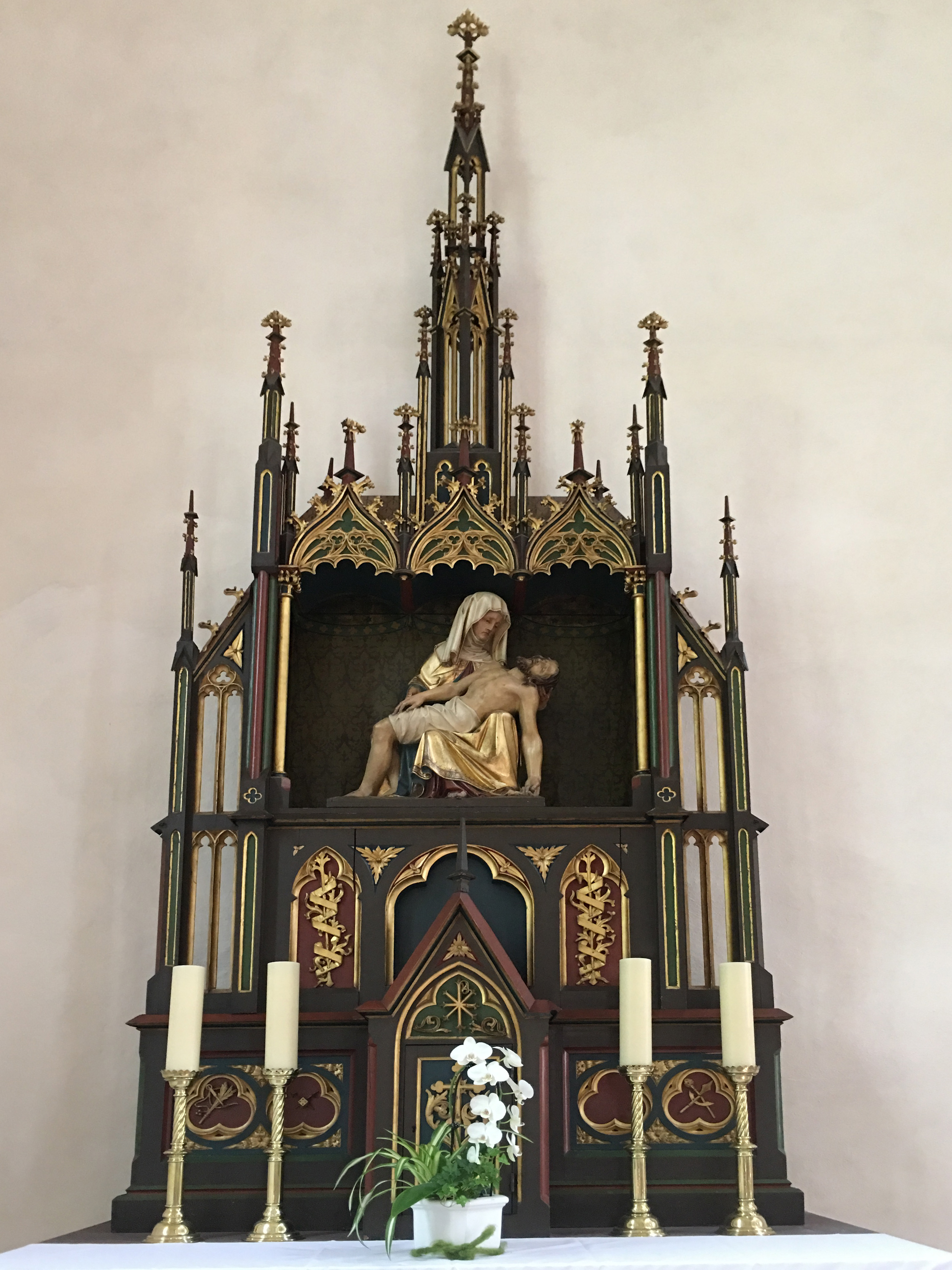 St. Georg in Bischofsheim an der Rhön - Neugotischer Seitenaltar - Pieta